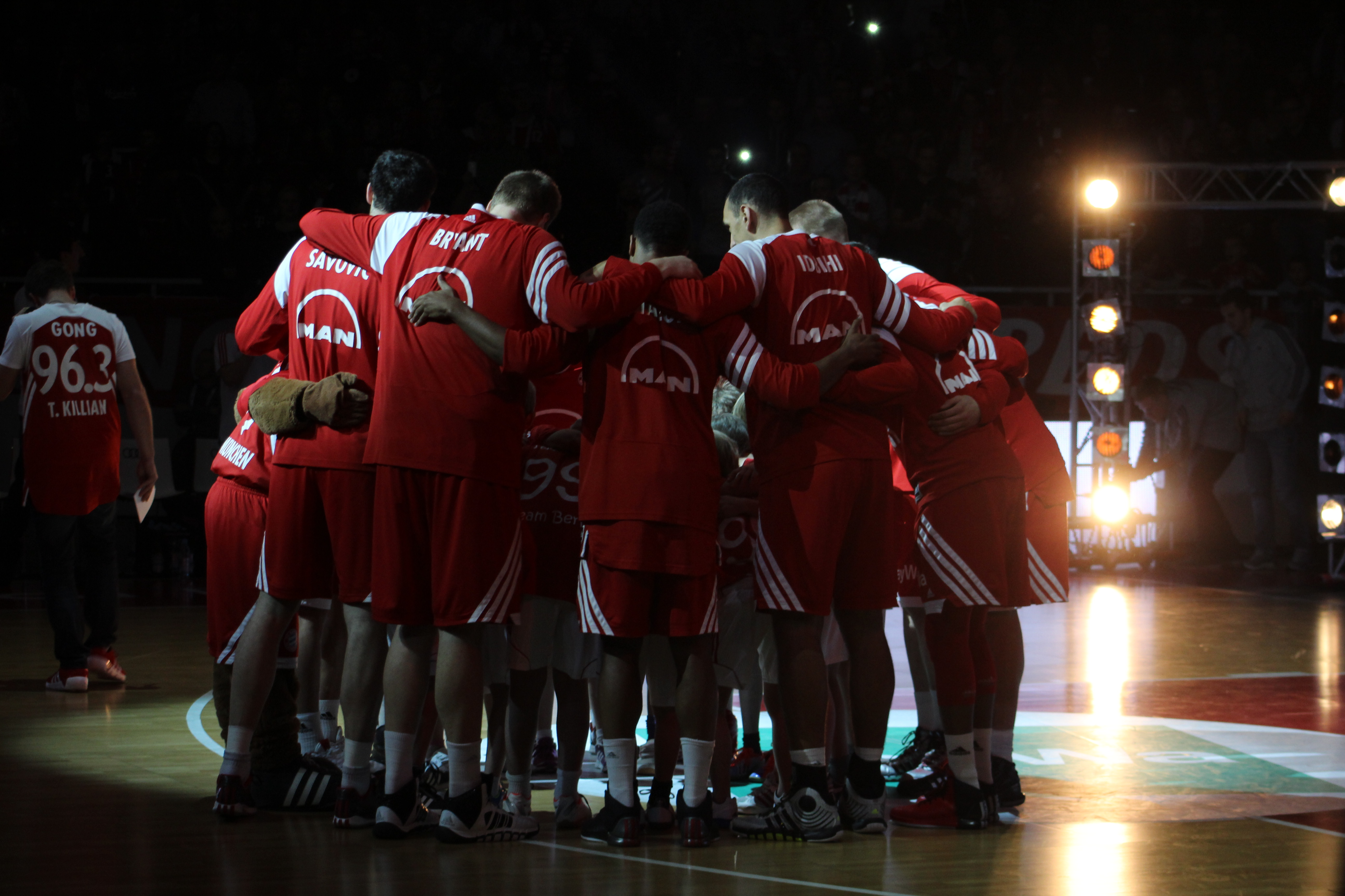 FC Bayern Basketball im Audidoom gegen Braunschweig